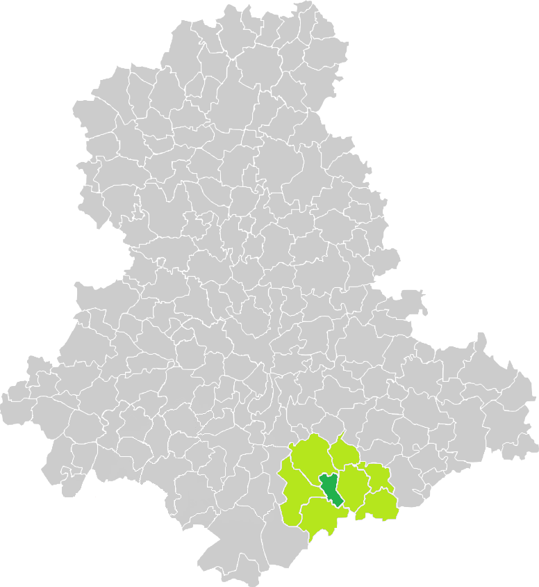 Carte de situation de la commune de Magnac-Bourg (en vert foncé) dans le votre Canton (en vert clair) sur une carte des communes de la Haute-Vienne